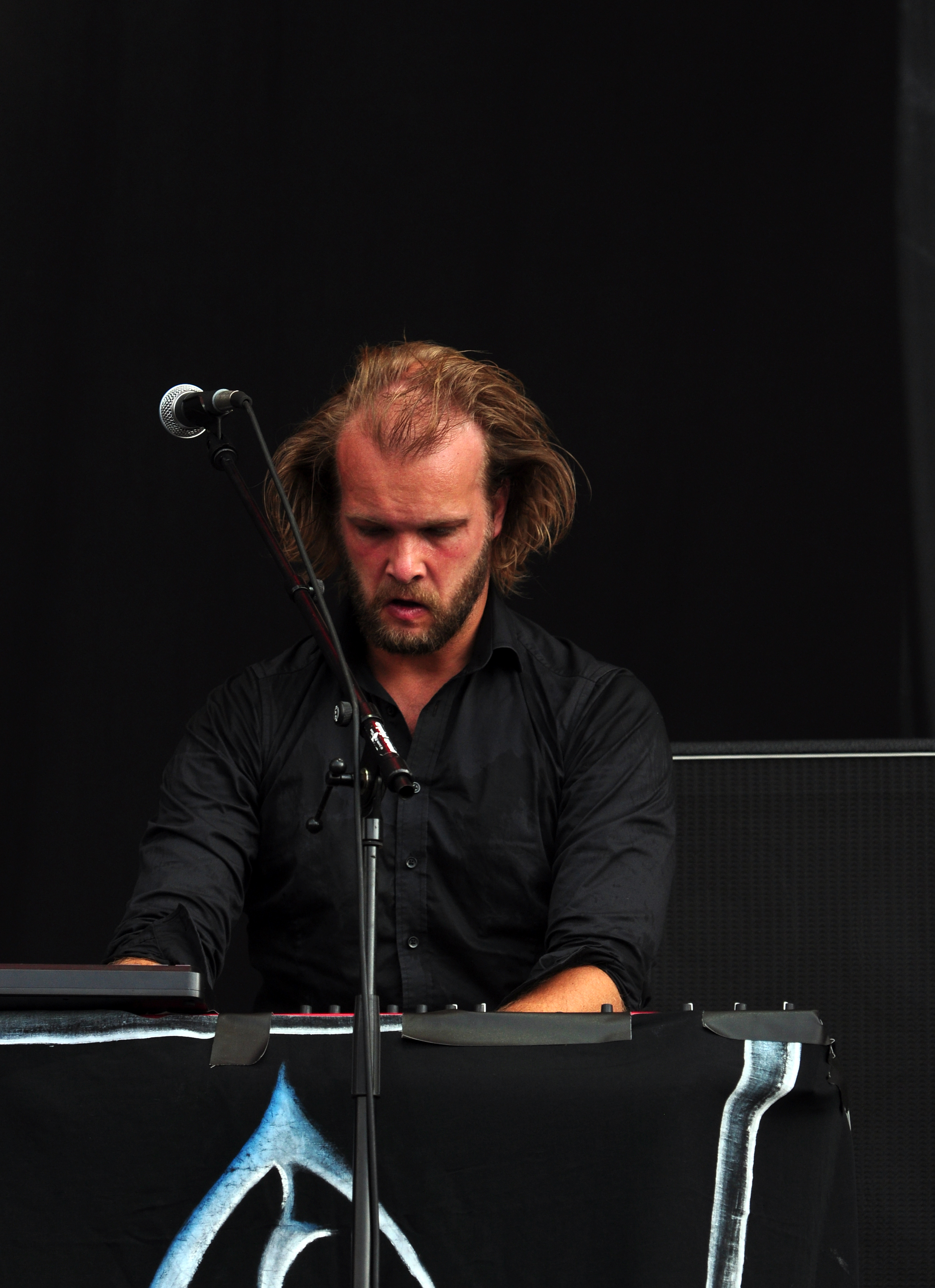 02-08-2014-Einar Solberg with Emperor at Wacken Open Air 2014-JonasR